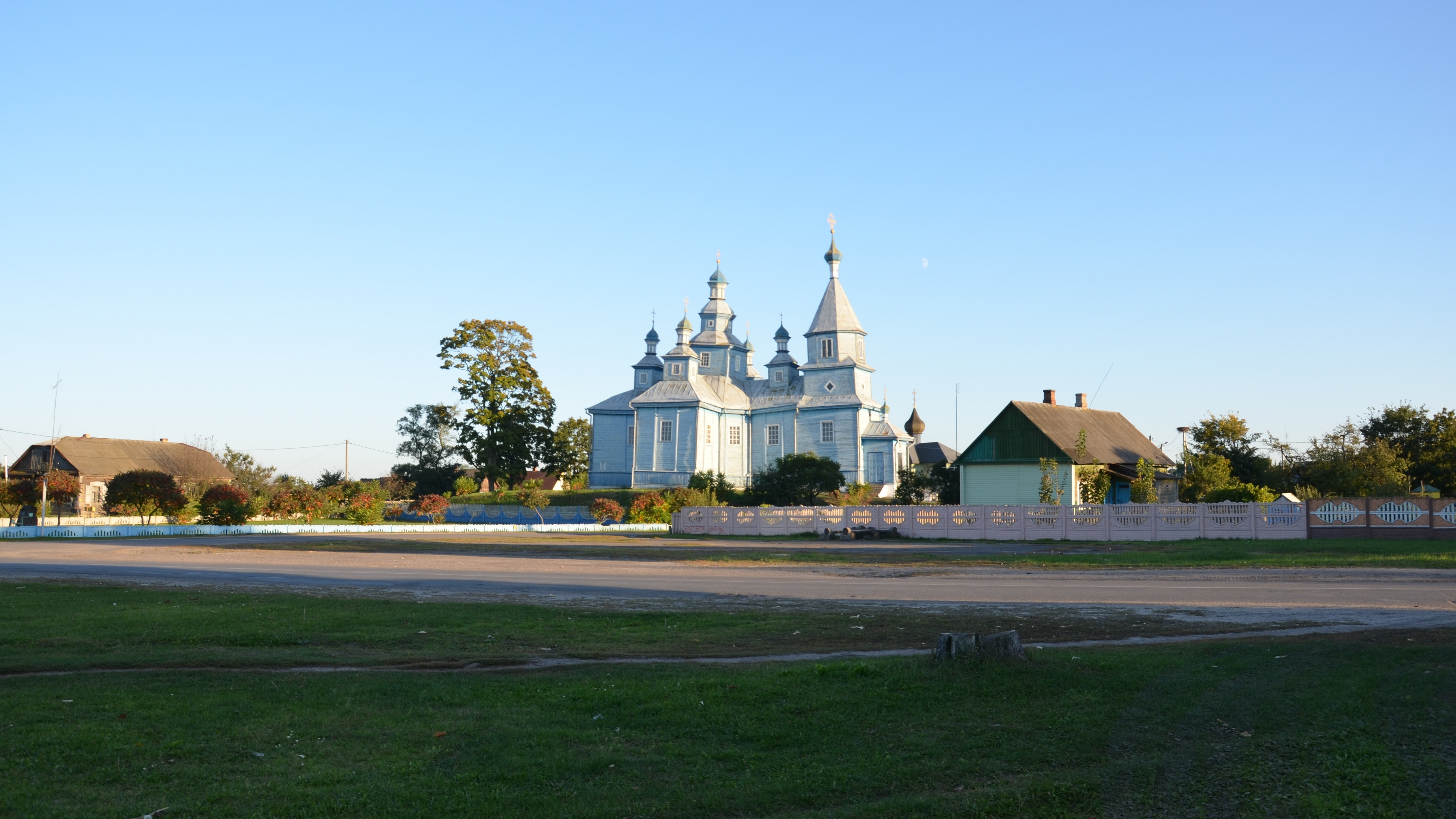 Свято-Николаевская церковь 1818 года, Кожан-Городок